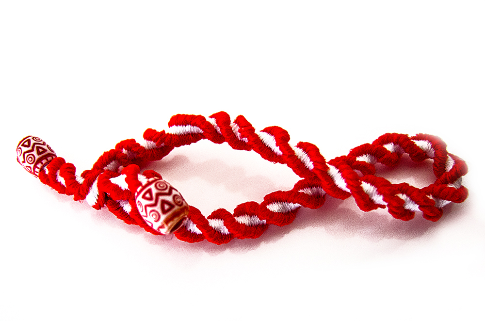 Мартеница, такой браслетик наденем на руку или украсим им цветущий куст, чтобы исполнились все желания